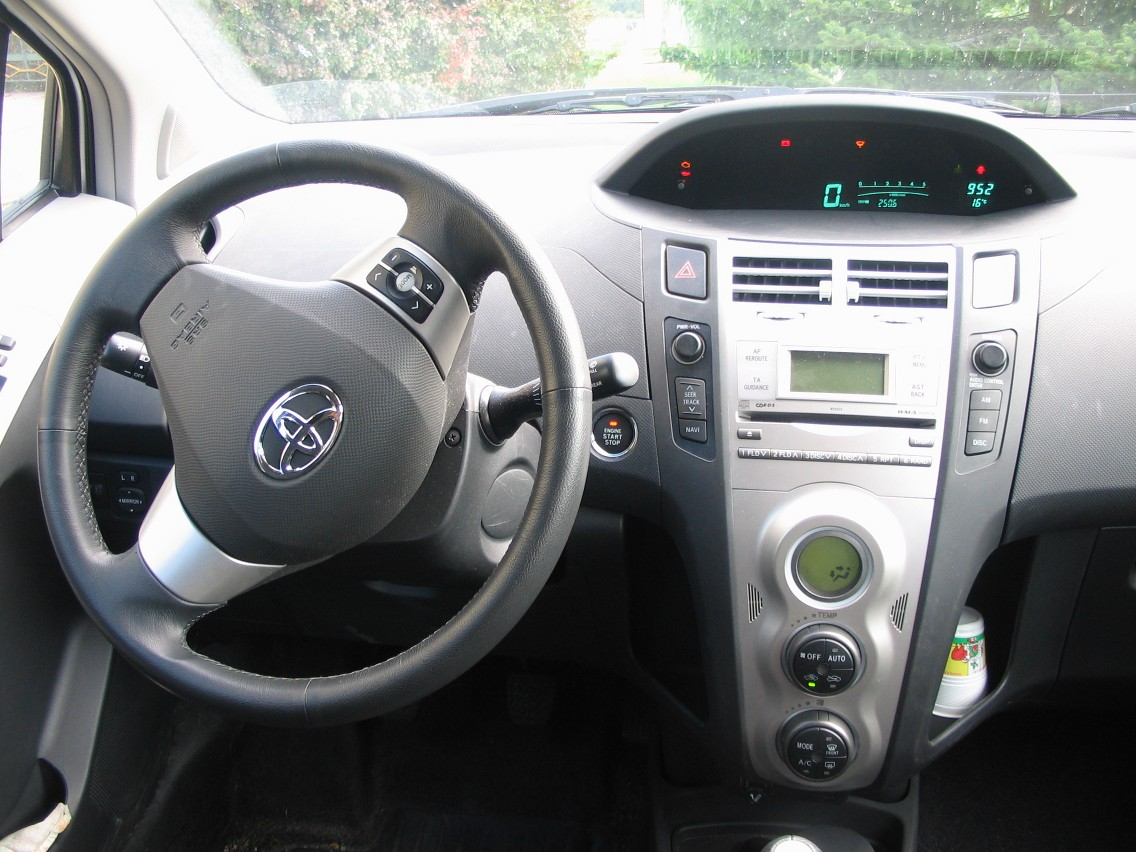 Planche de bord Toyota Yaris D4-D, mod. 2007.